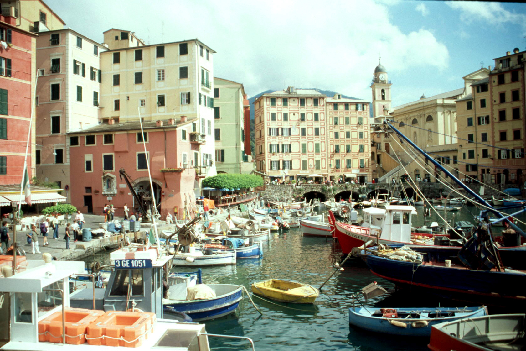 Camogli 2004